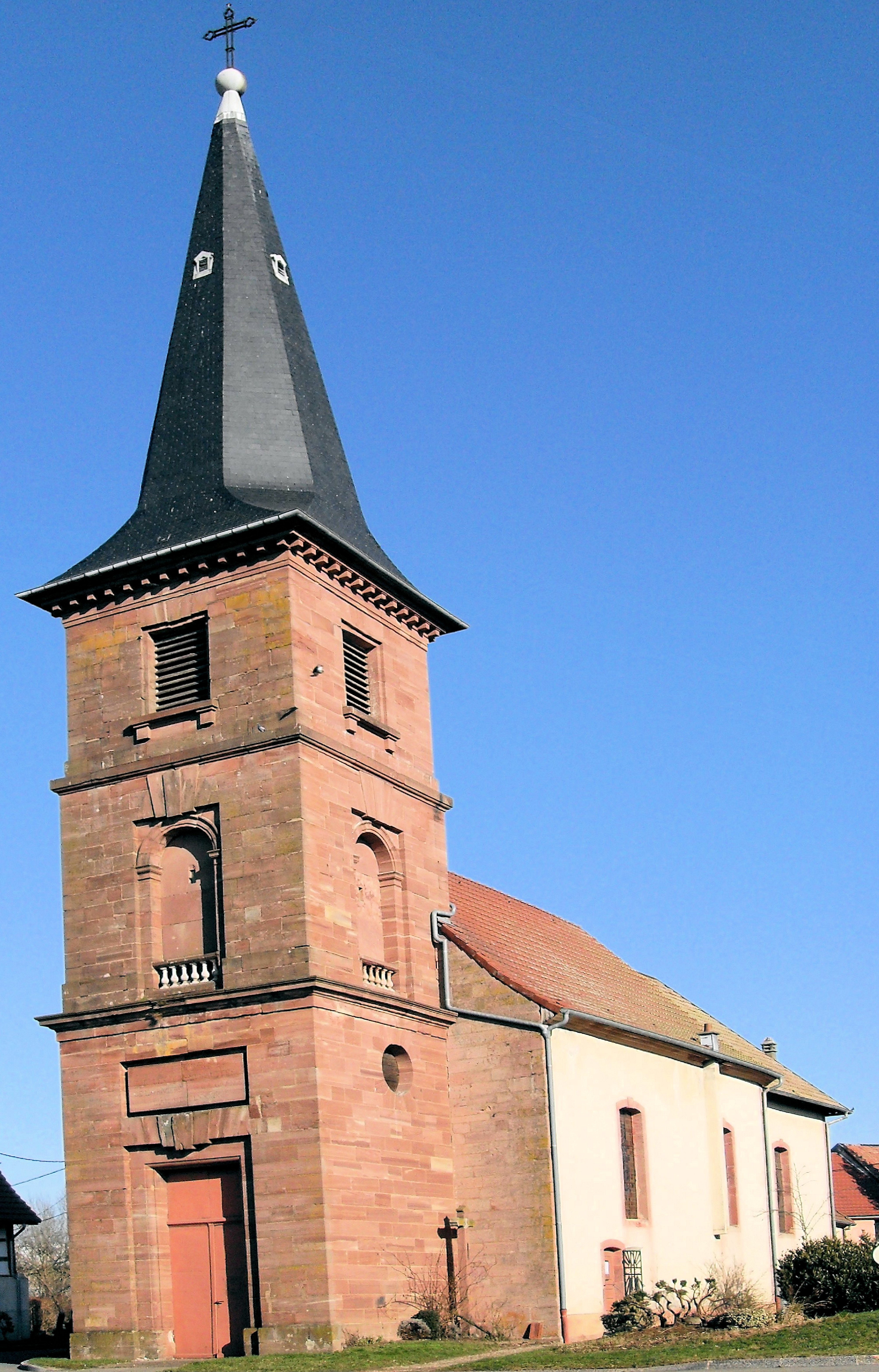 L'église Saint-Quirin à Larivière